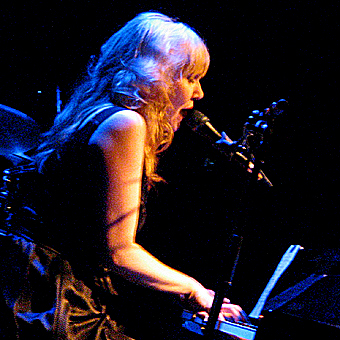 Astrid Swan at Tavastia (Helsinki, Finland) 28 jan 2006